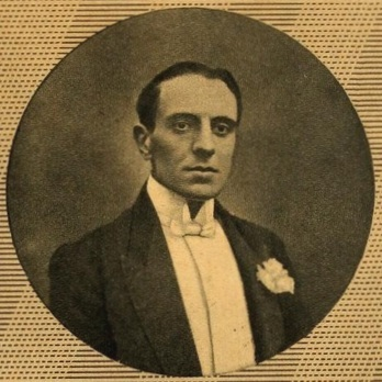 L'attore Alberto Capozzi Foto tratta da "Cinema" n. 95, 10 giugno 1940